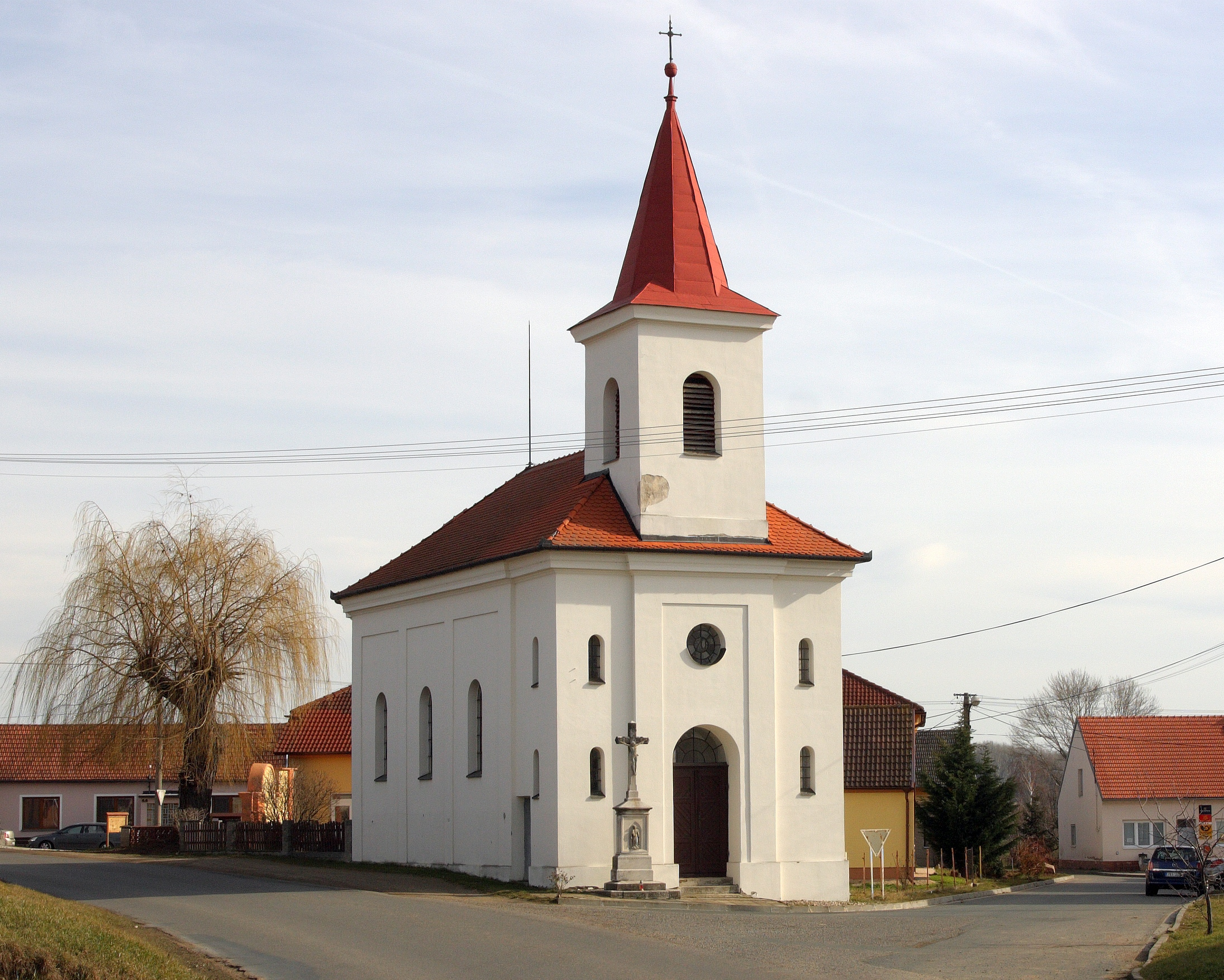 Němčičky (okres Brno-venkov) - kaple Narození Panny Marie.